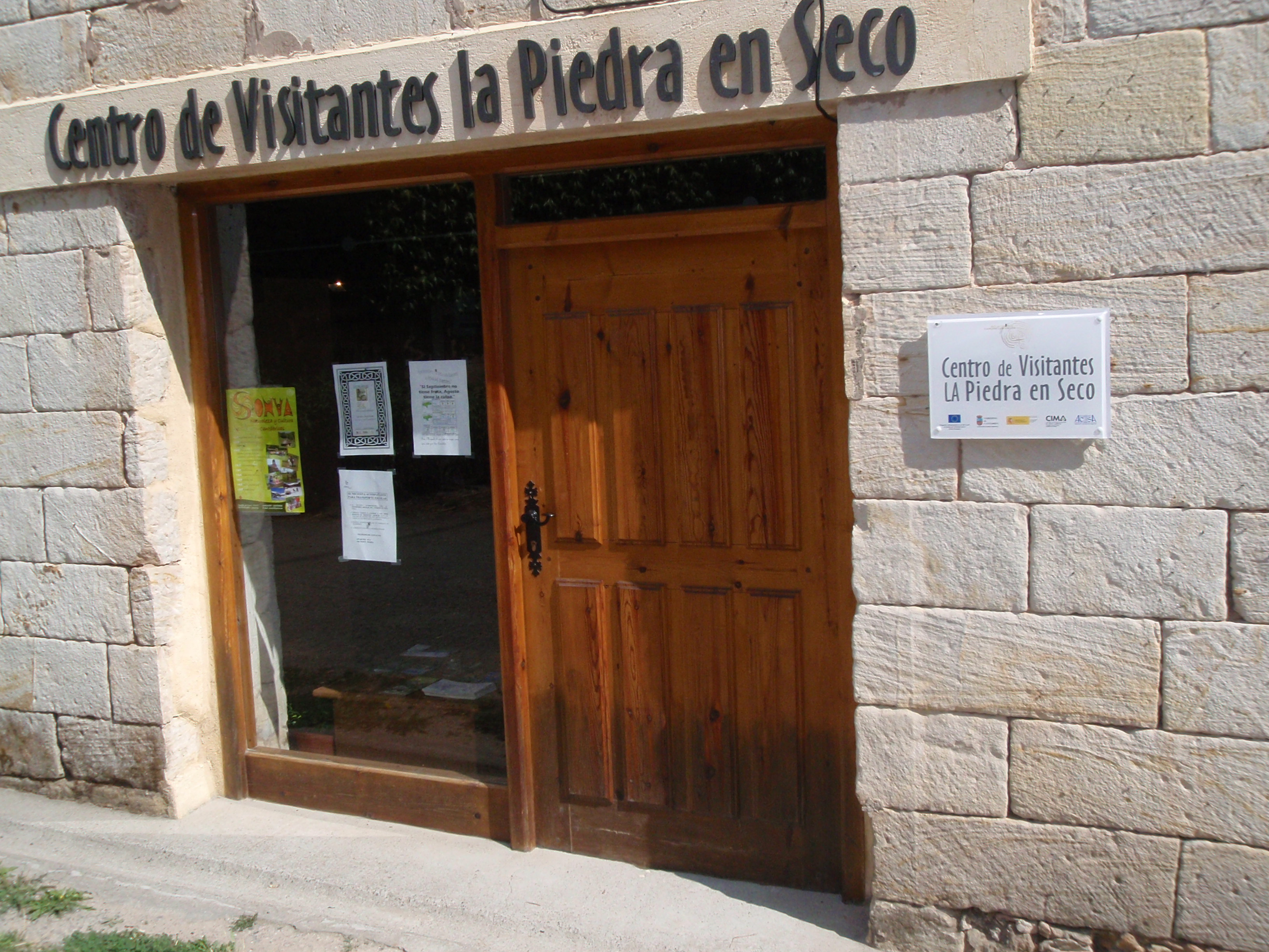 Puerta de entrada al Centro de Visitantes de la Piedra en Seco en Puente del Valle, Valderredible (Cantabria).